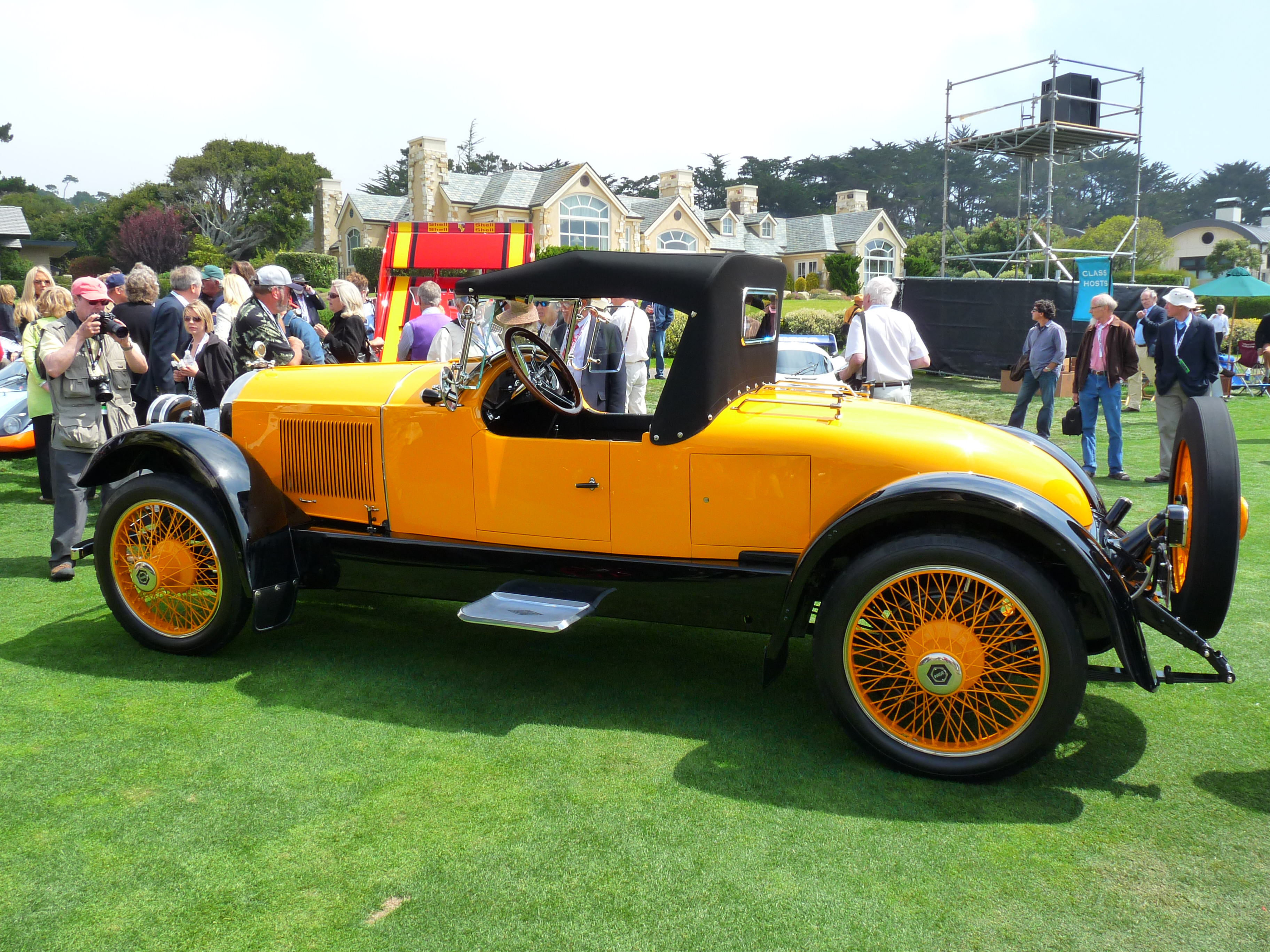 1921 Paige Model 6-66 Daytona Speedster